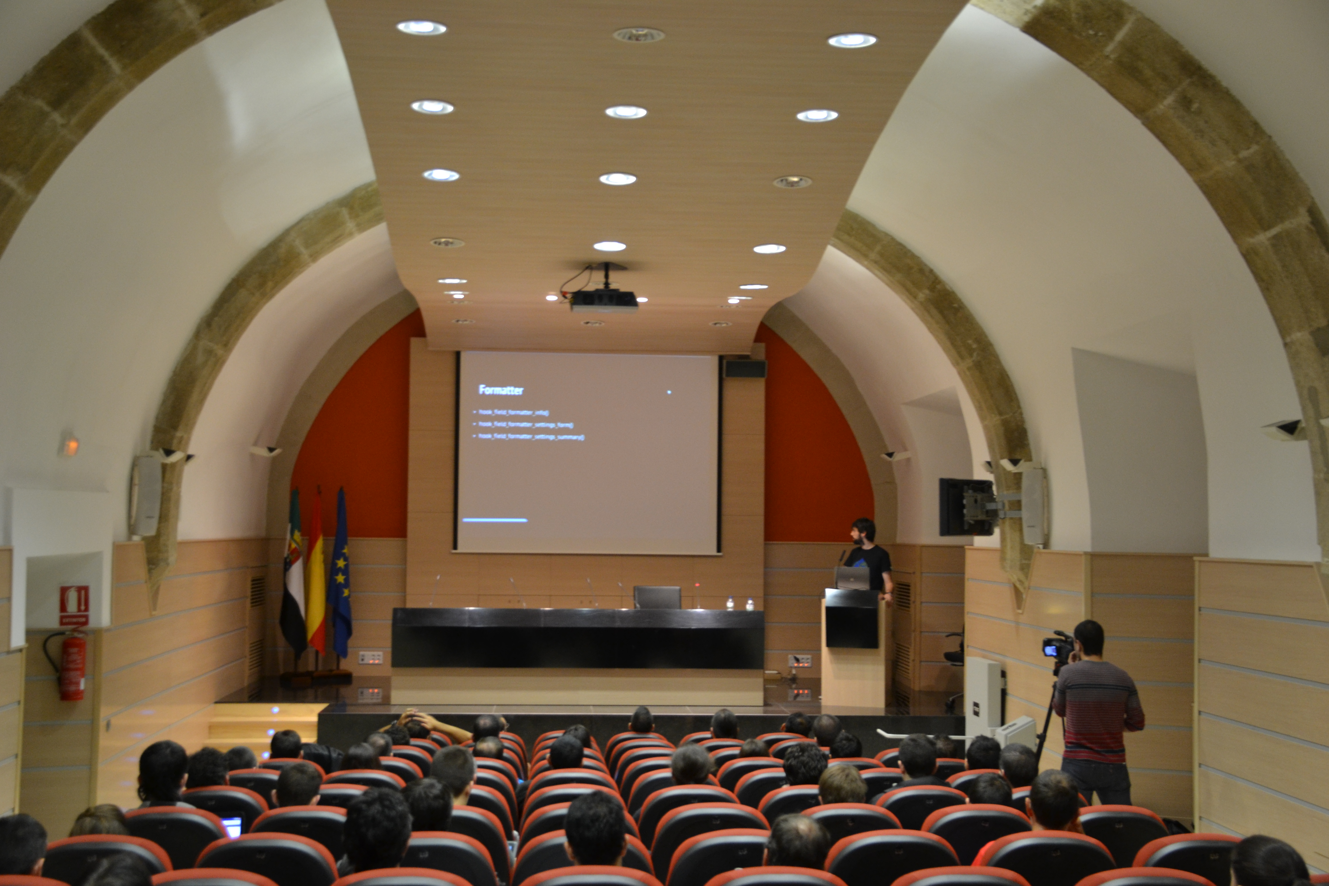 Sala Europa del monasterio de San Francisco el Real, Cáceres, España.